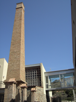 Xemeneia de la Fassina Balanyà de l'Espluga de Francolí